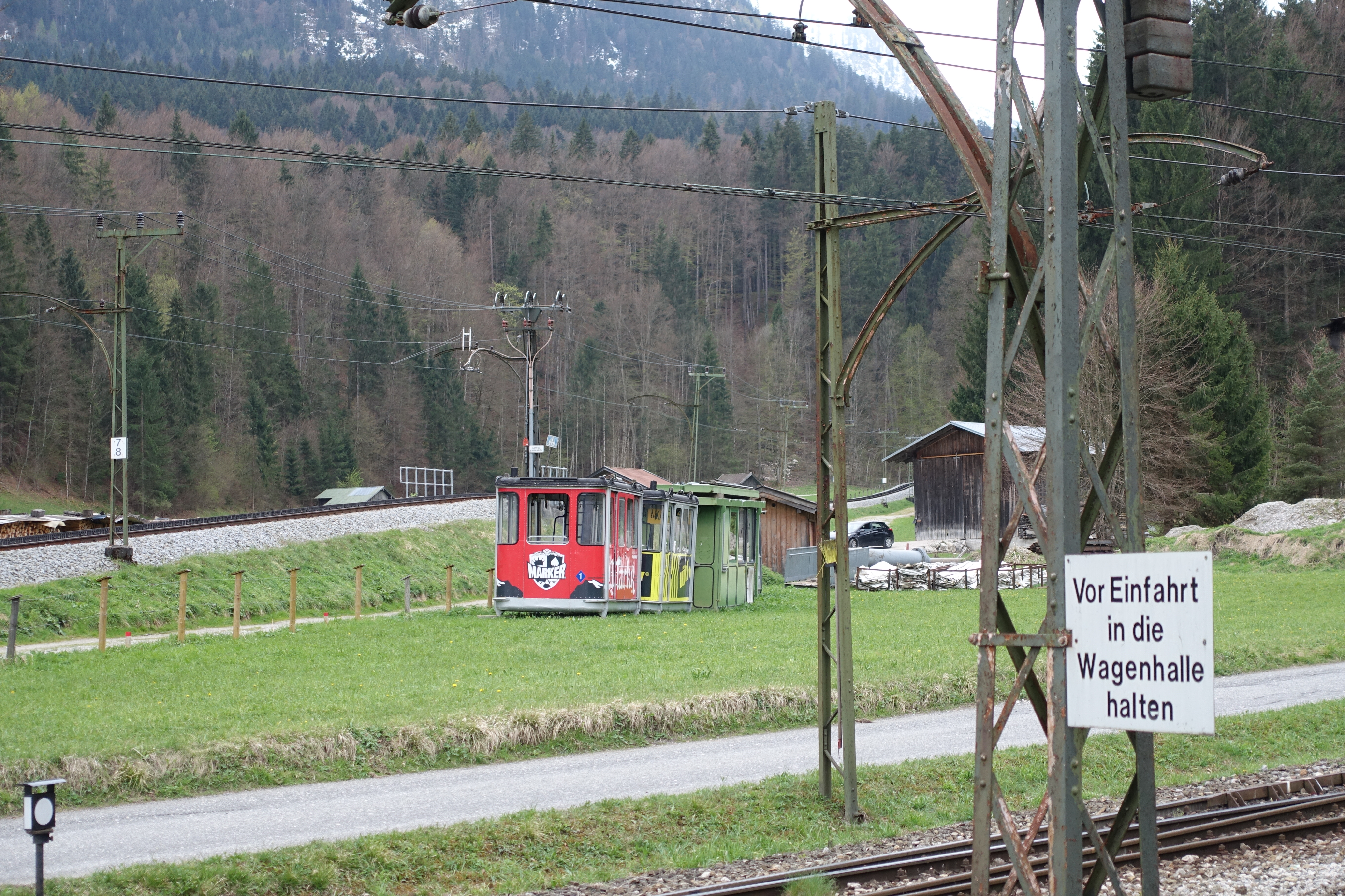 Kabinen der Eibseeseilbahn am 1. Mai 2017 im Betriebswerk der Zugspitzbahn in Grainau.